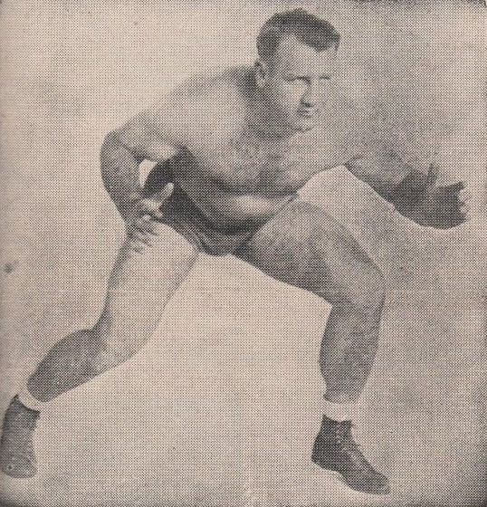 Une du journal Sports Facts du 25 avril 1950 avec les photos de Bronko Nagurski et Dick Raines.